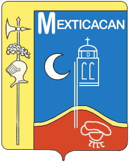 Escudo de Armas de Mexticacán